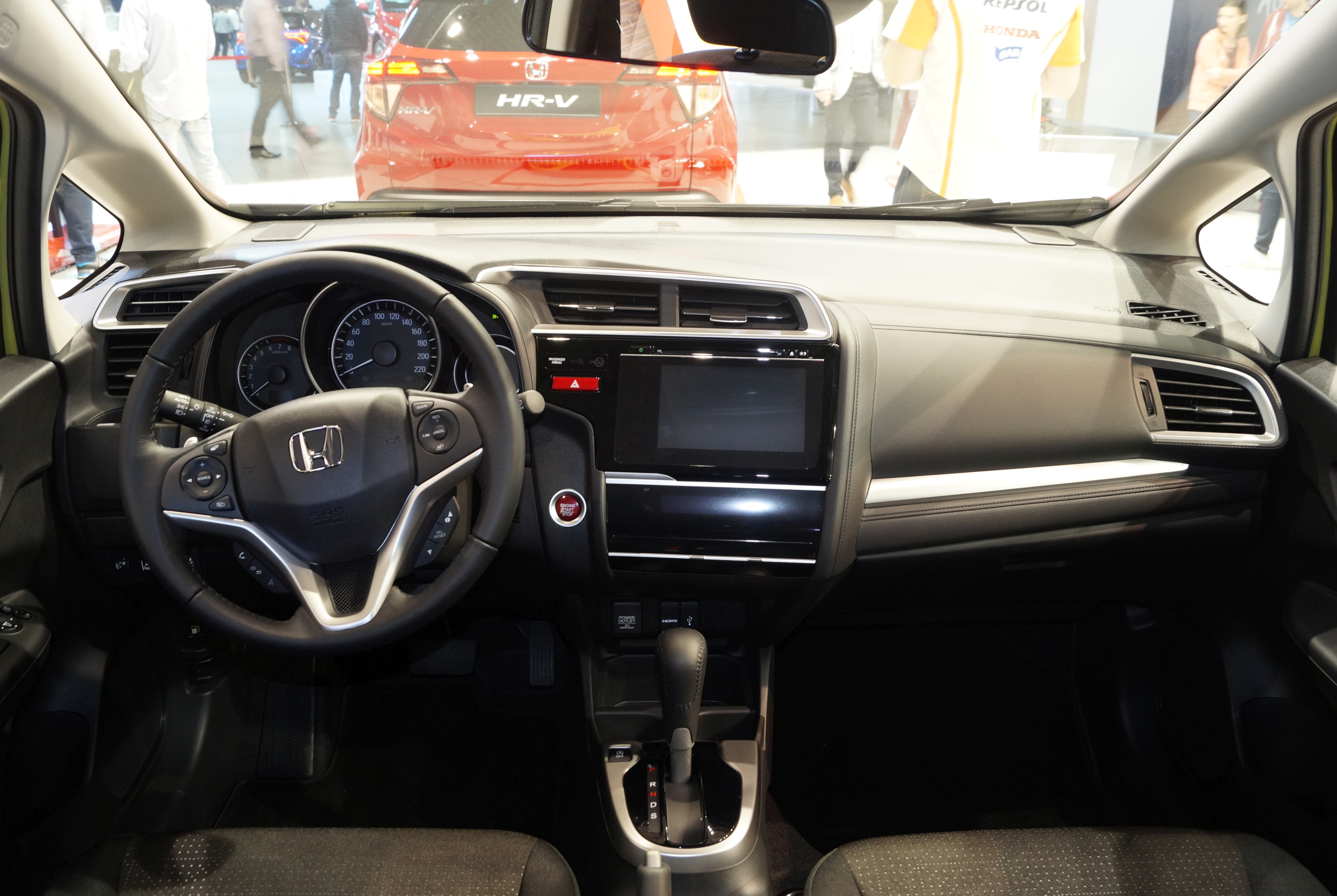 Wnętrze Hondy Jazz na Motor Show Poznań 2017.